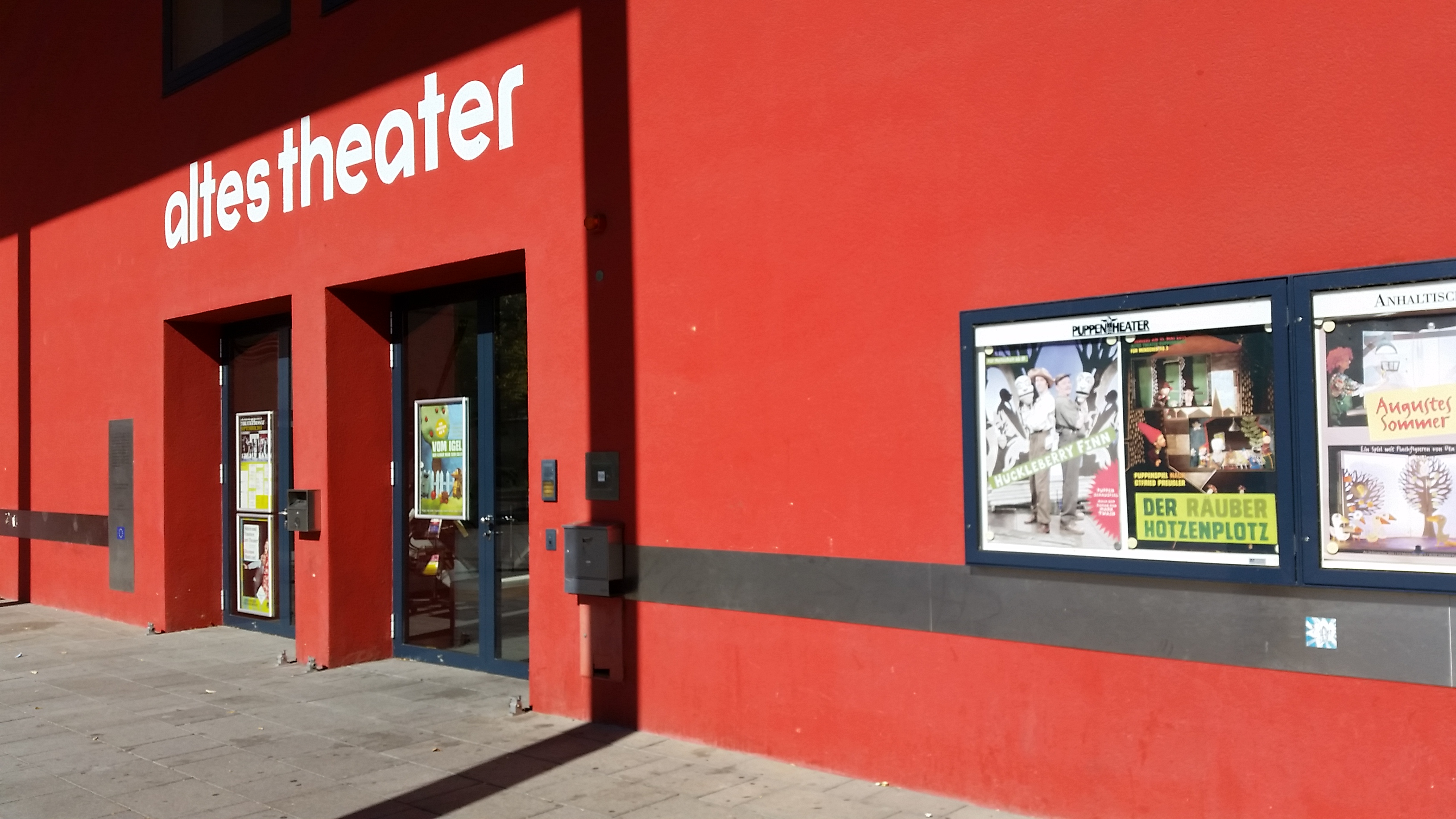 Das Alte Theater am Lily Herking-Platz ist eine Theaterspielstätte des Anhaltischen Theaters mit Café-Restaurant in Dessau-Roßlau. Blick von Süden.